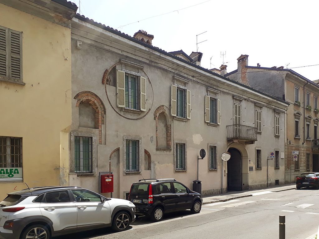 Lodi, edificio in via XX Settembre 8. Si notino sulla sinistra della facciata i resti della chiesa di San Pietro in Brolo.